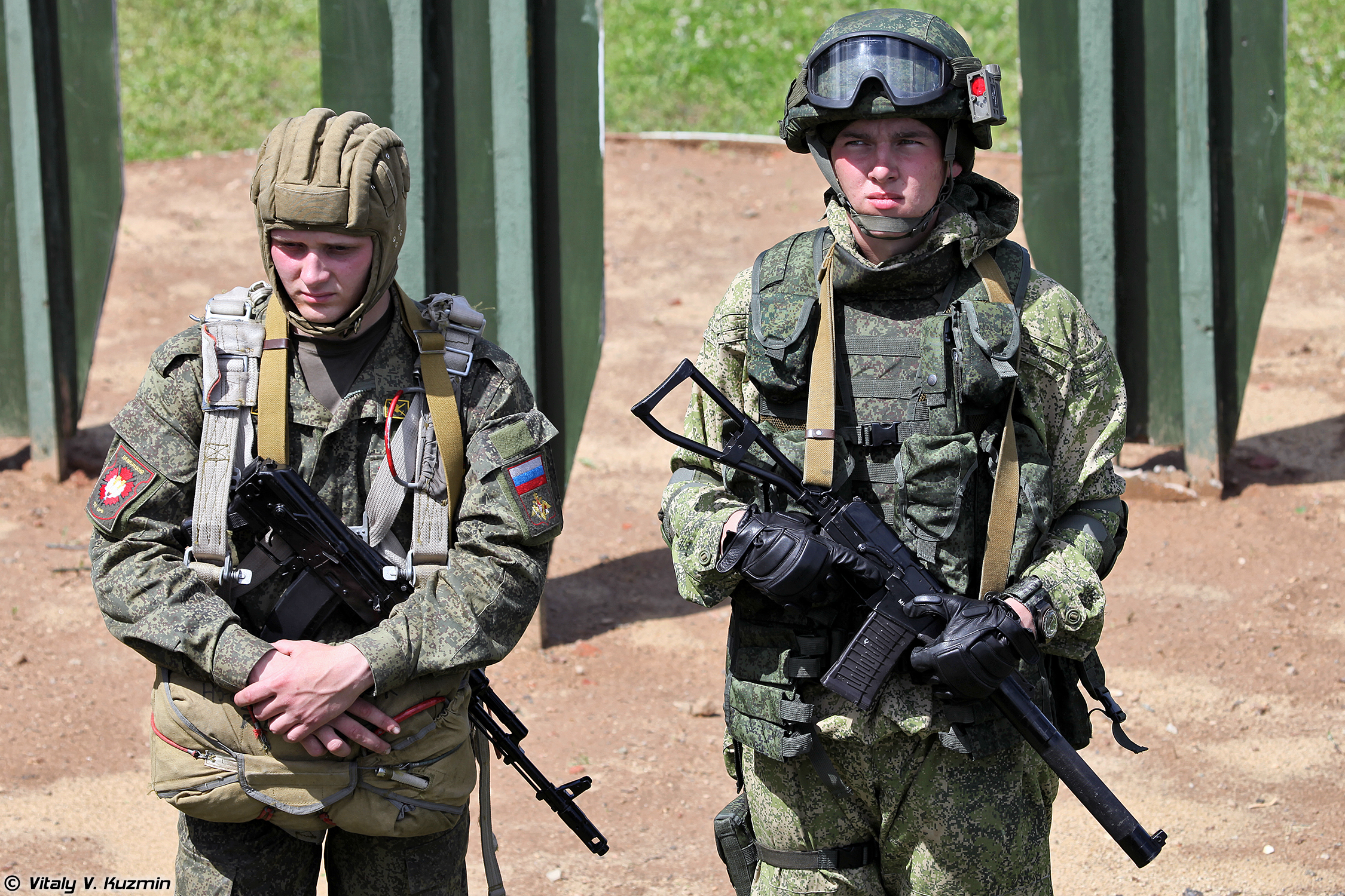 Комплект боевой экипировки Ратник для разведчика и экипировка для совершения прыжков с парашютом (Ratnik infantry combat system in recon variant and paratrooper's equipment)